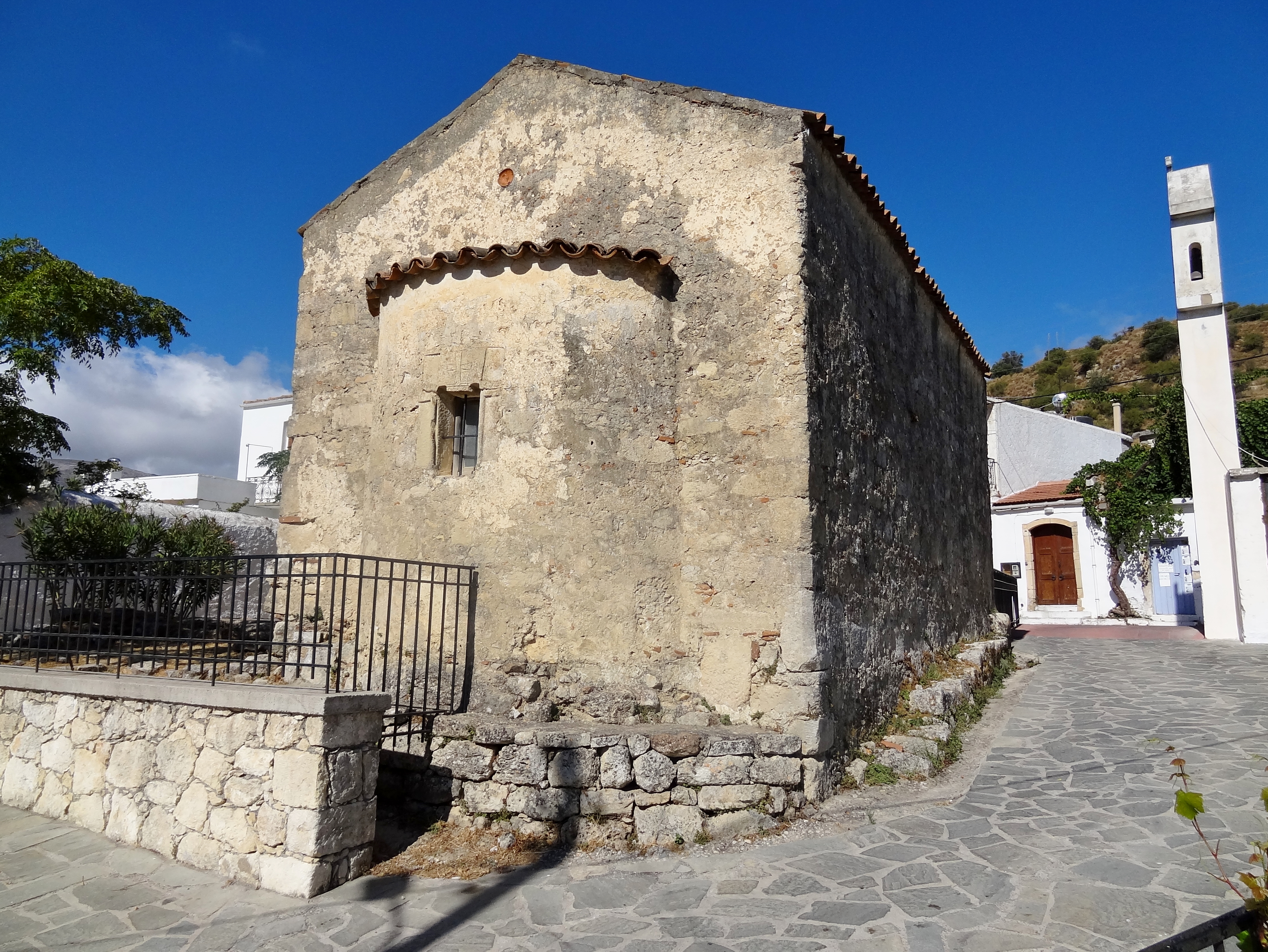 Marienkirche (Ναός Παναγίας) von Thronos, Gemeinde Amari, Kreta, Griechenland